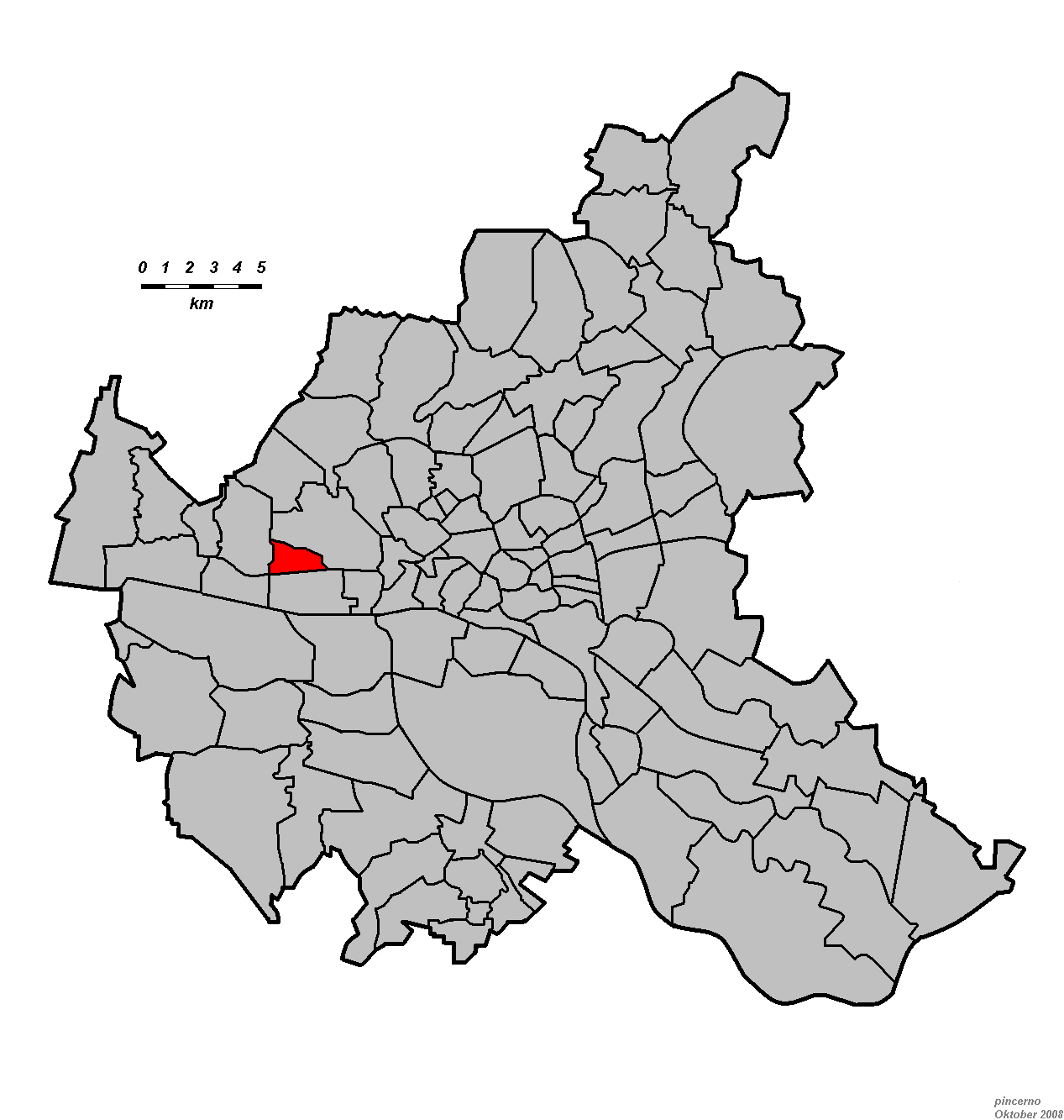 Hamburg: Stadtteil Hamburg-Groß Flottbek